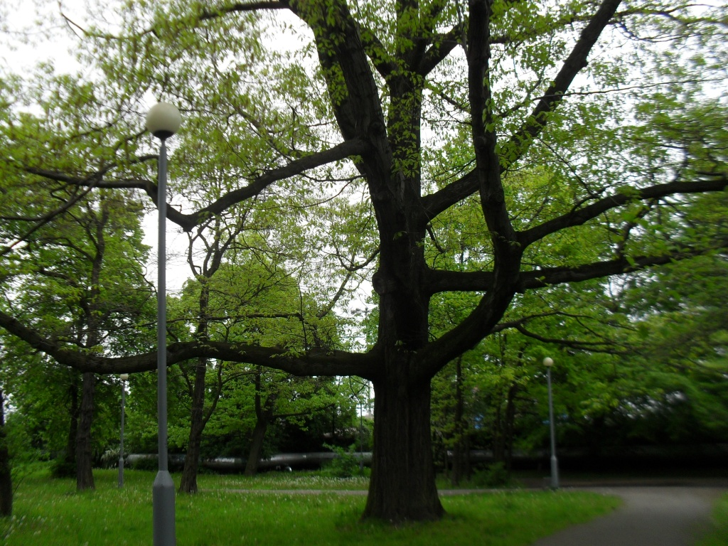 822. Dąb czerwony - pomnik przyrody - park Steffensa